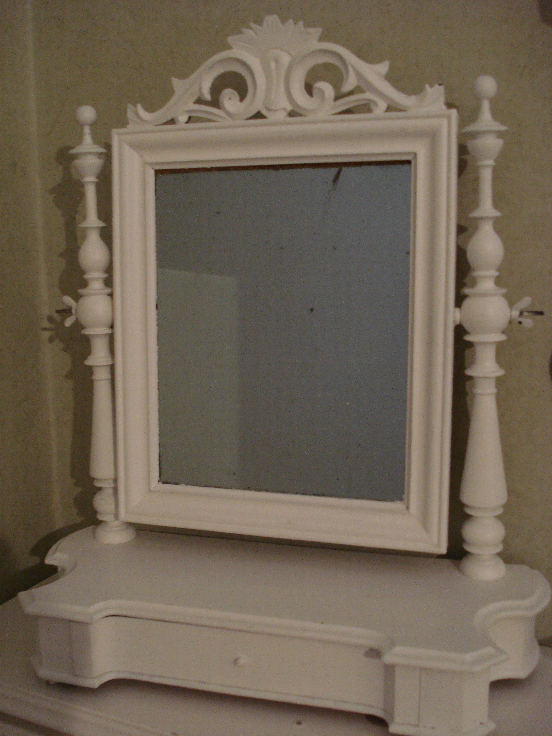 En pigtittare